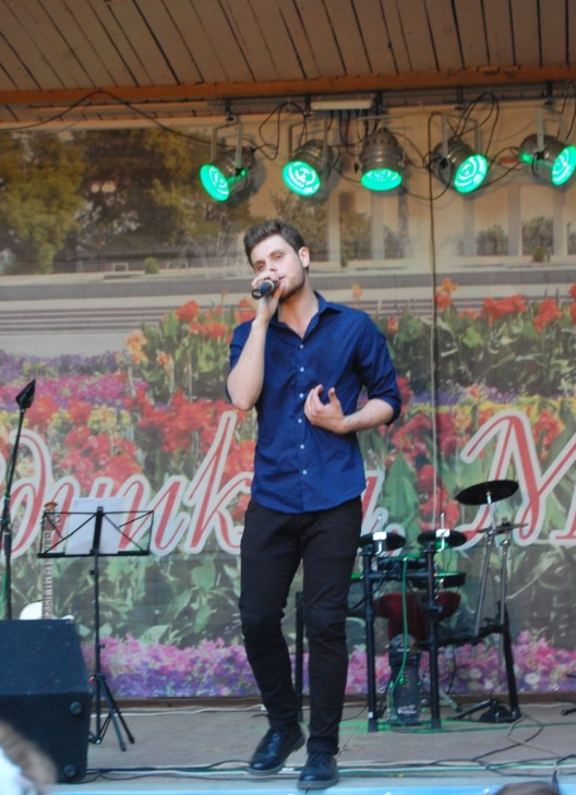 Полуфиналист Х фактора